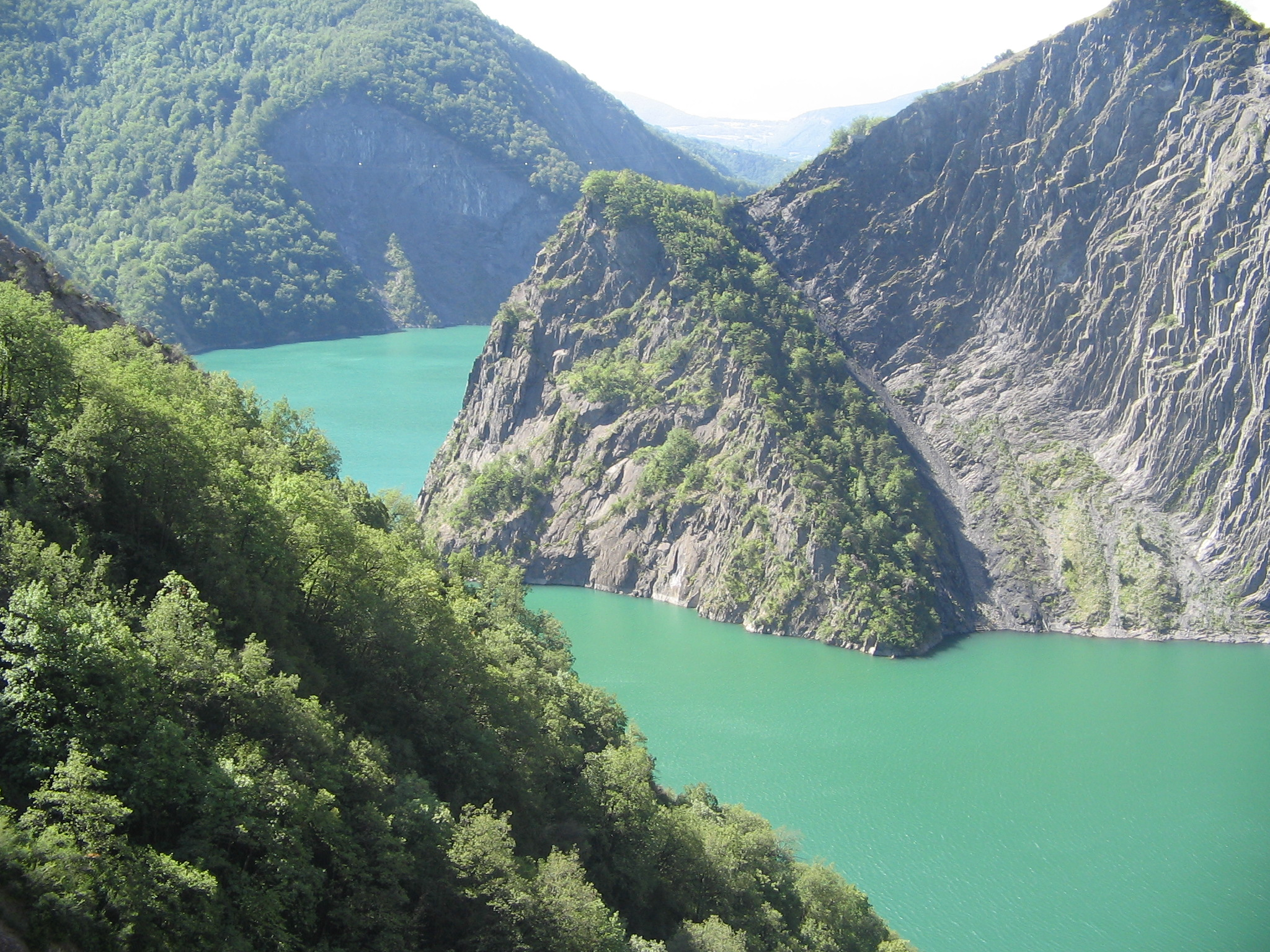 Lac de Monteynard, département de l'Isère